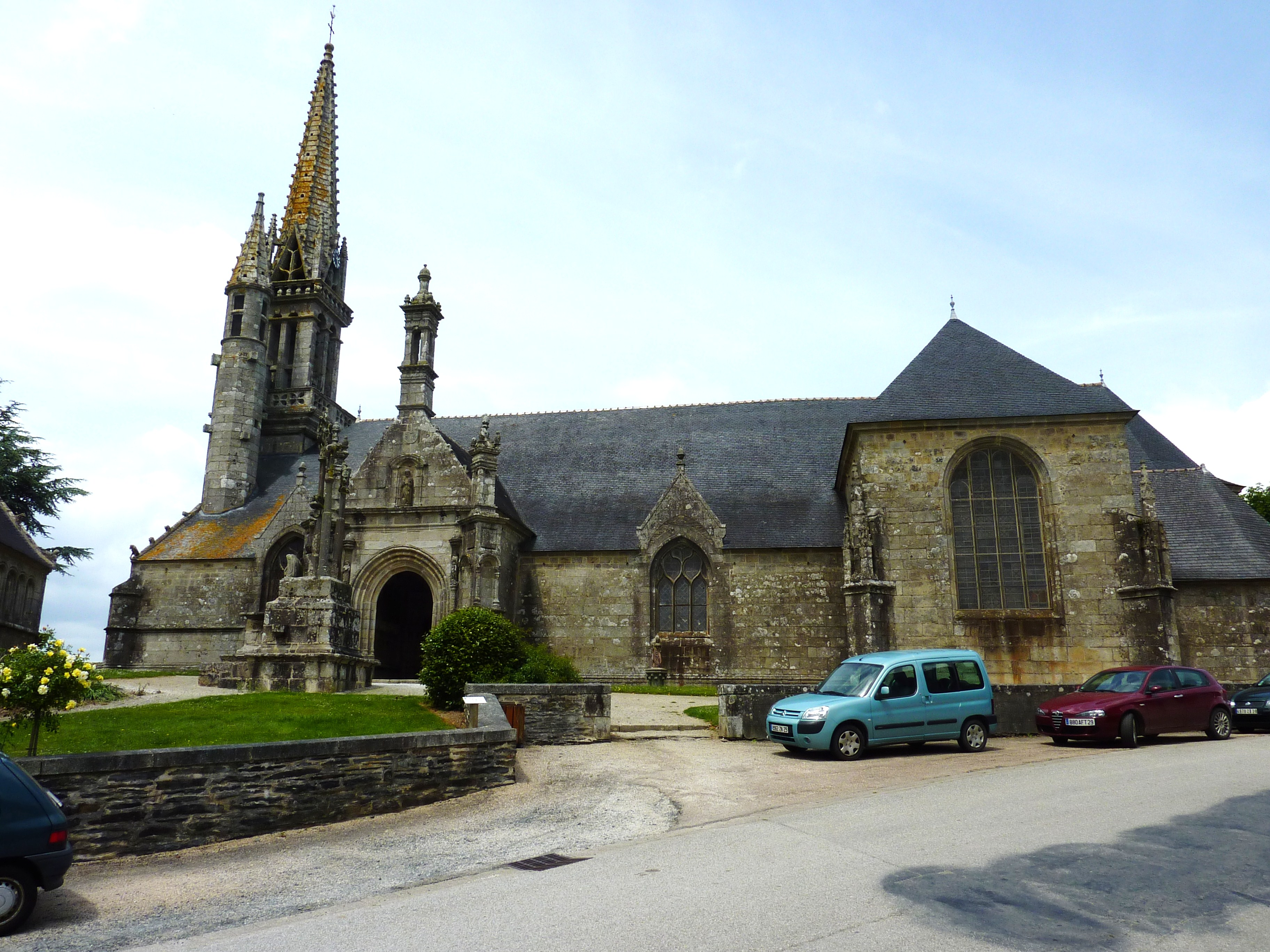 Brasparts: Eglise Notre-Dame-et-Saint-Tugen; vue générale côté sud